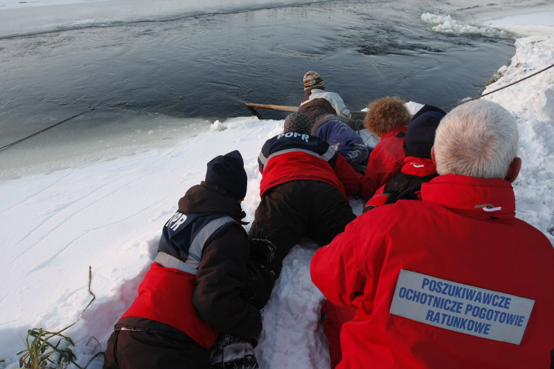 Poszukiwania zaginionych geologów w miejscowości Rzędziany (k. Białegostoku) z udziałem 8 ratowników POPR Sprawdzanie zatopionego Nissana Patrol podwodną kamerą